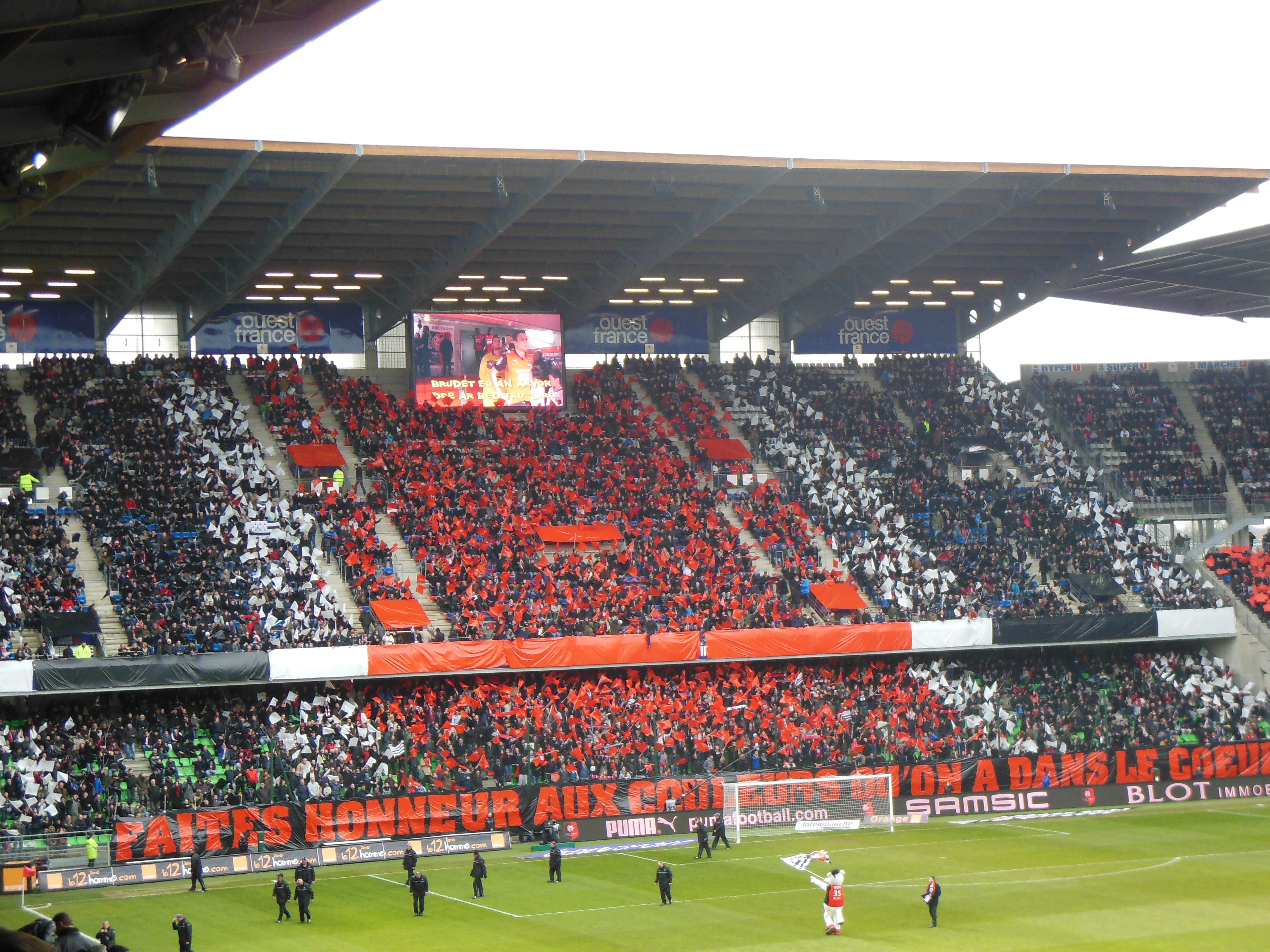 Tifo formé par des drapeaux, déployé par le Roazhon celtic kop le 6 avril 2013 avant une rencontre face au Paris Saint-Germain. En bas de tribune, une banderole déployée par le RCK : "Faites honneur aux couleurs qu'on a dans le cœur"